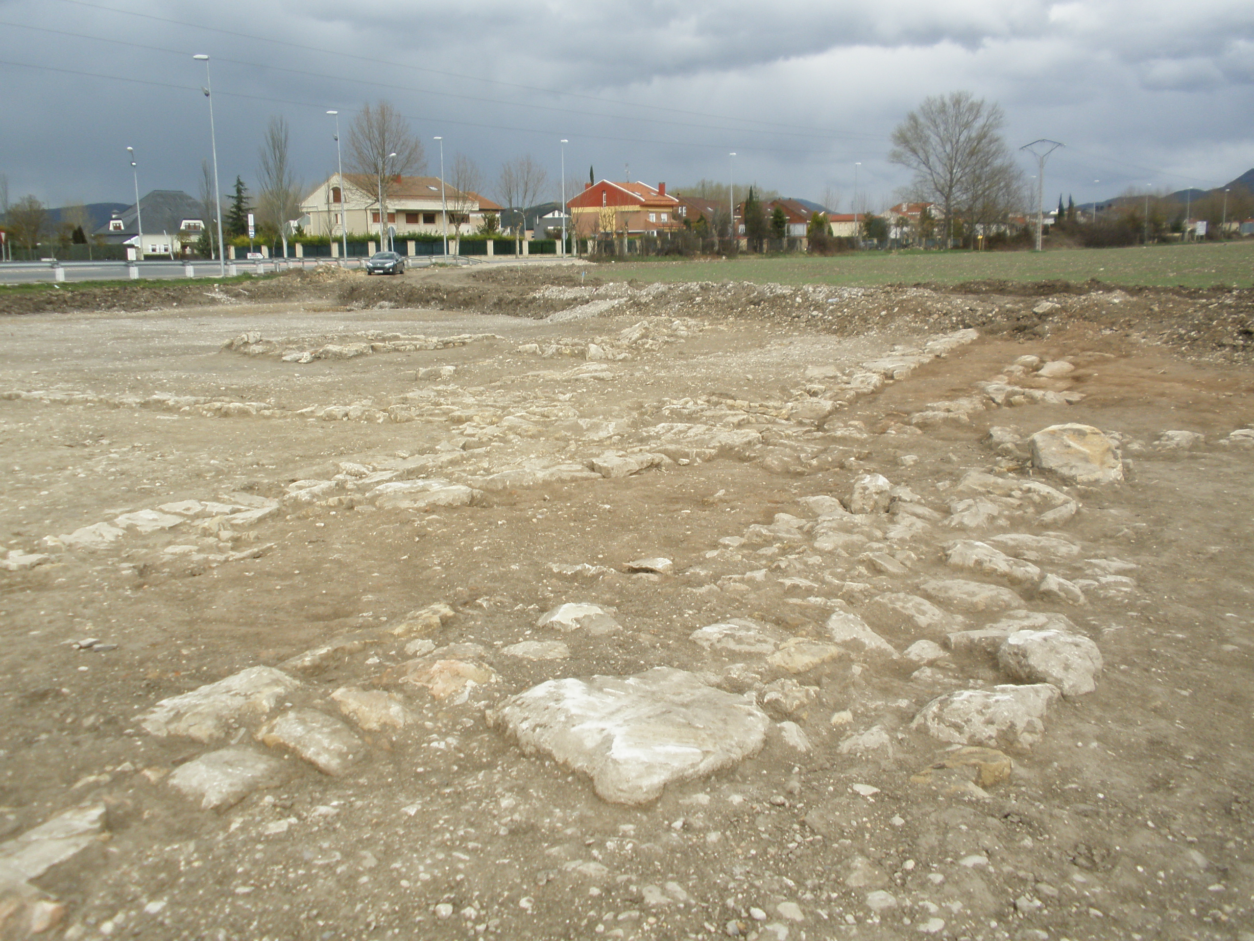 Restos arqueológicos romanos correspondientes a Deóbriga en el yacimiento de Arce-Mirapérez (Miranda de Ebro, España).